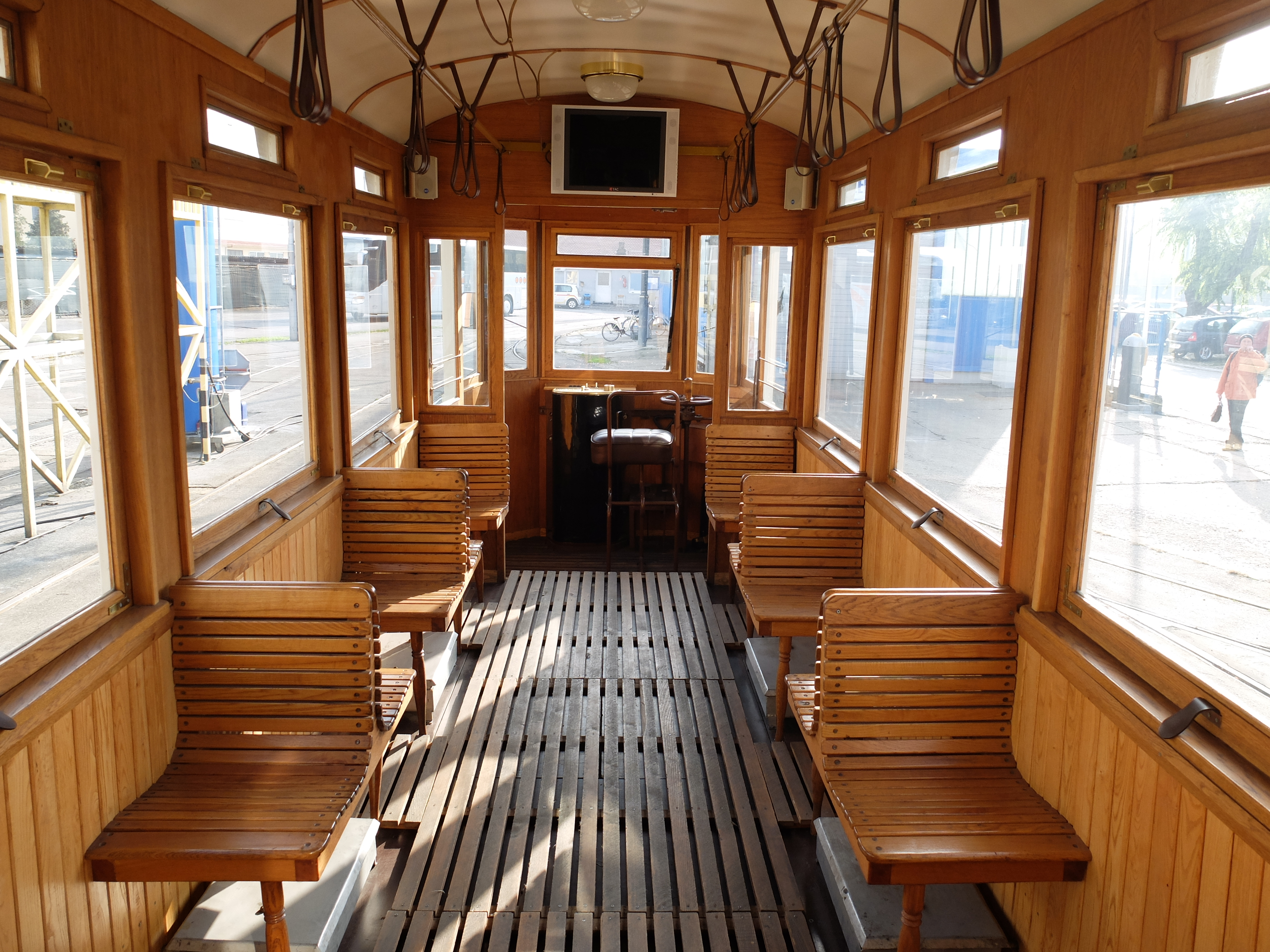 Innenansicht der historischen Straßenbahn Nr. 8 in Osijek